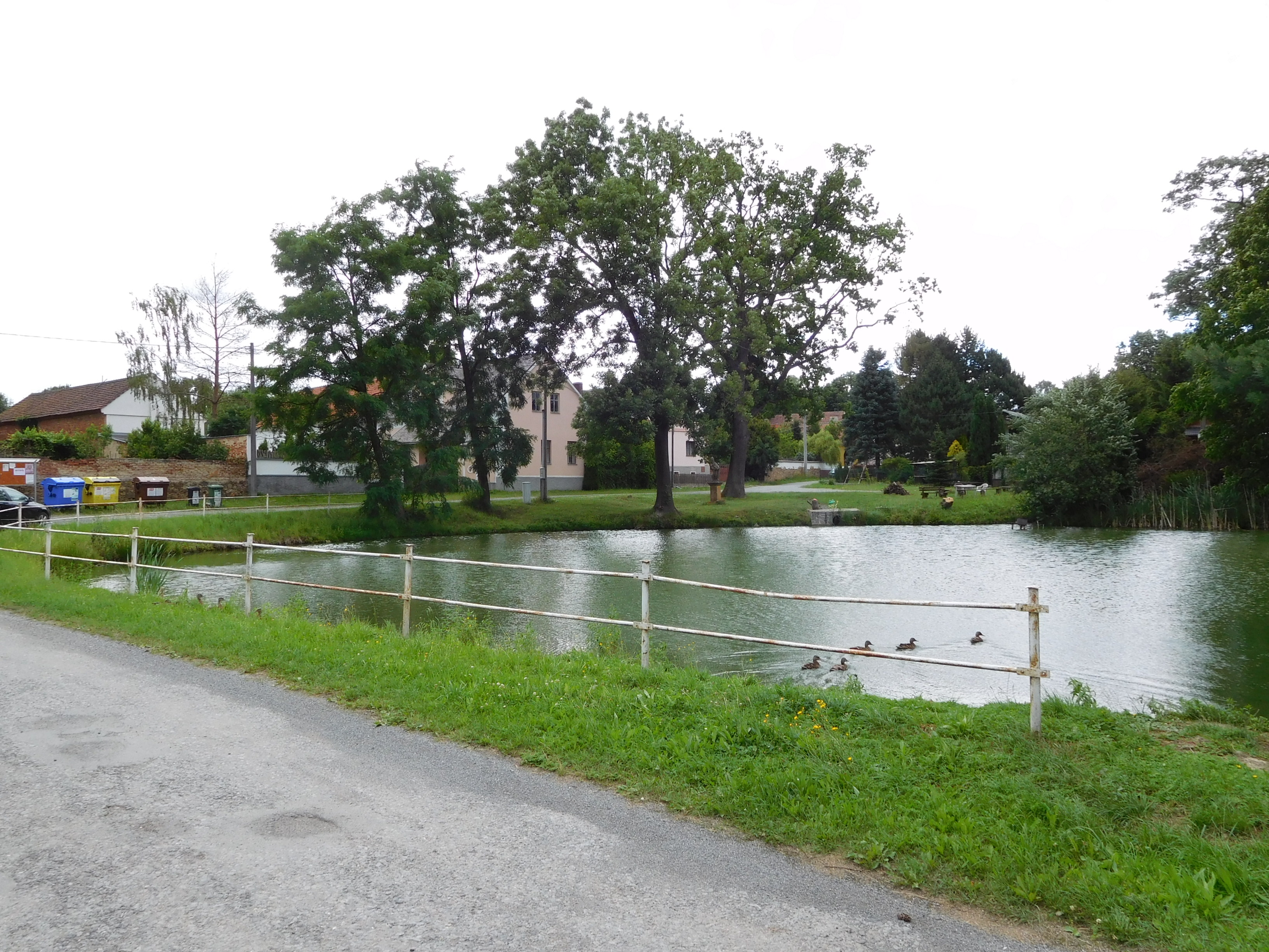 Třebobuz - náves s rybníčkem